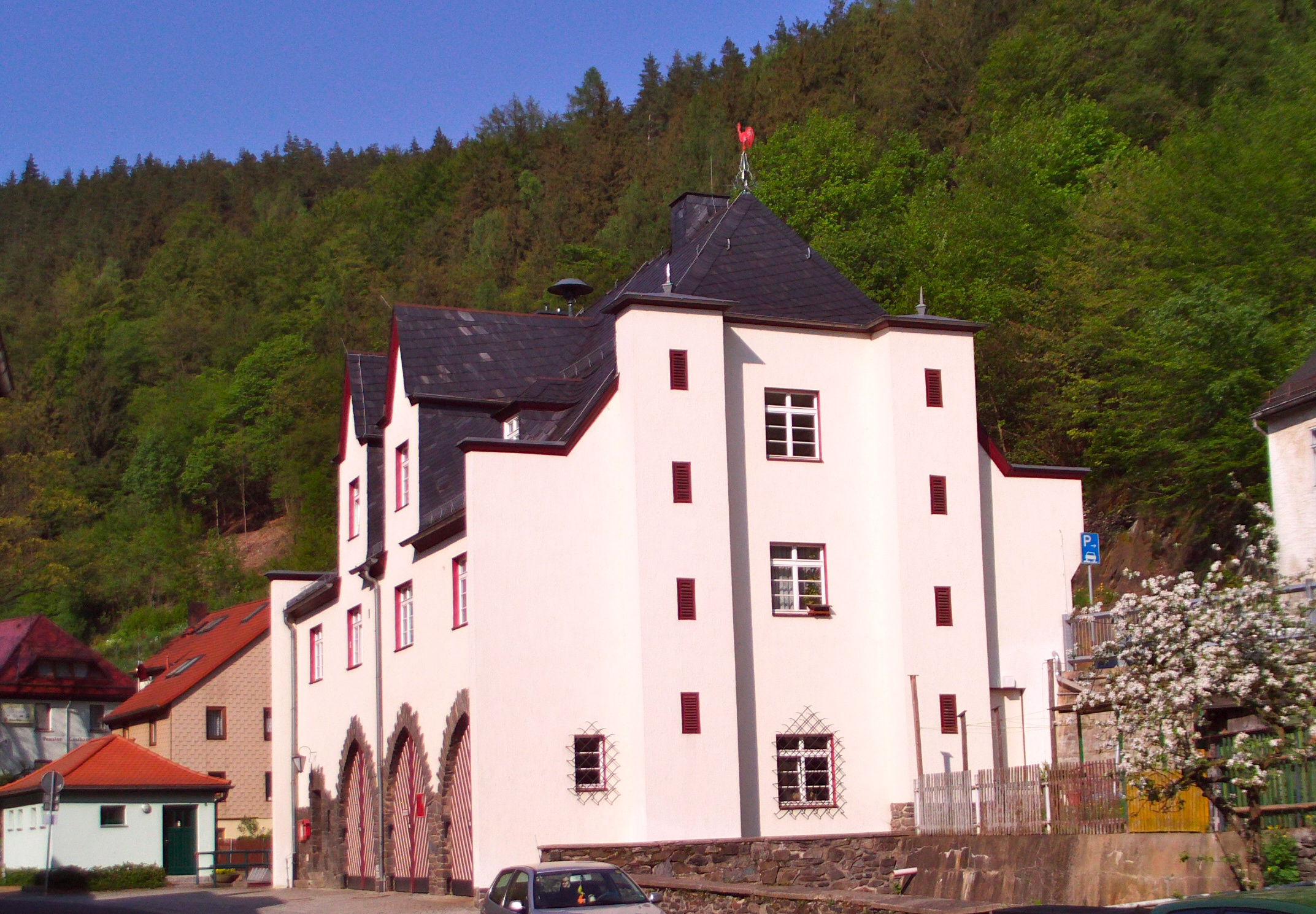 Feuerwehr Ziegenrück